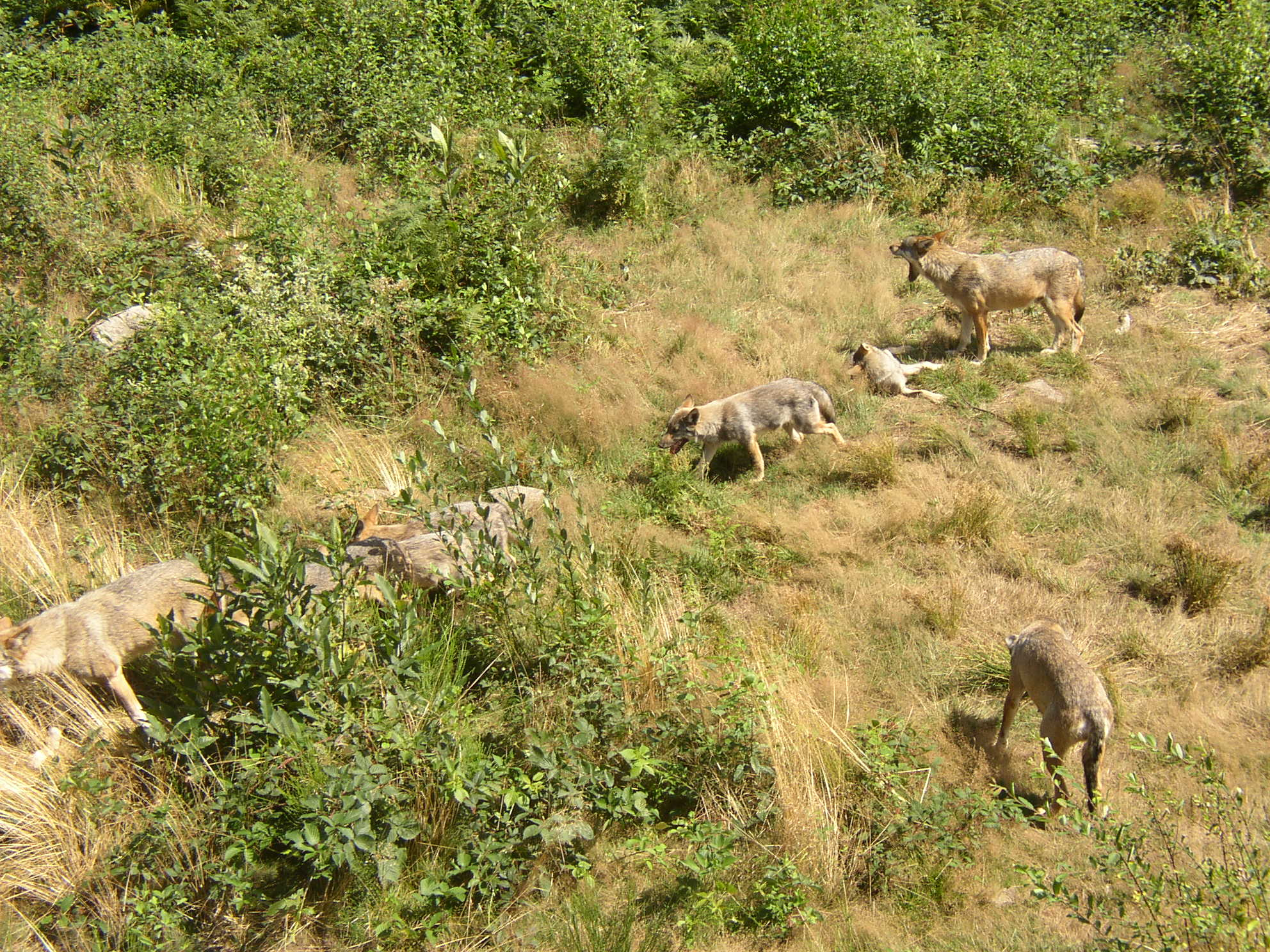 Loups de Chabrières